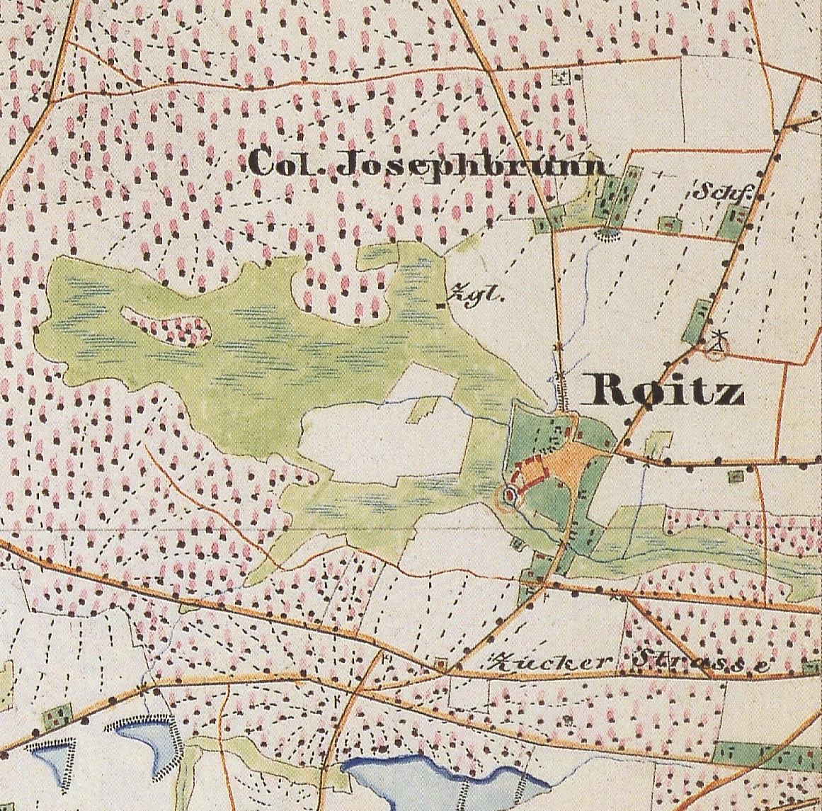 Roitz, ehemalige Gemeinde, nahe Spremberg, Landkreis Spree-Neiße, Brandenburg, Ausschnitt aus dem Urmesstischblatt 4451 Welzow von 1846